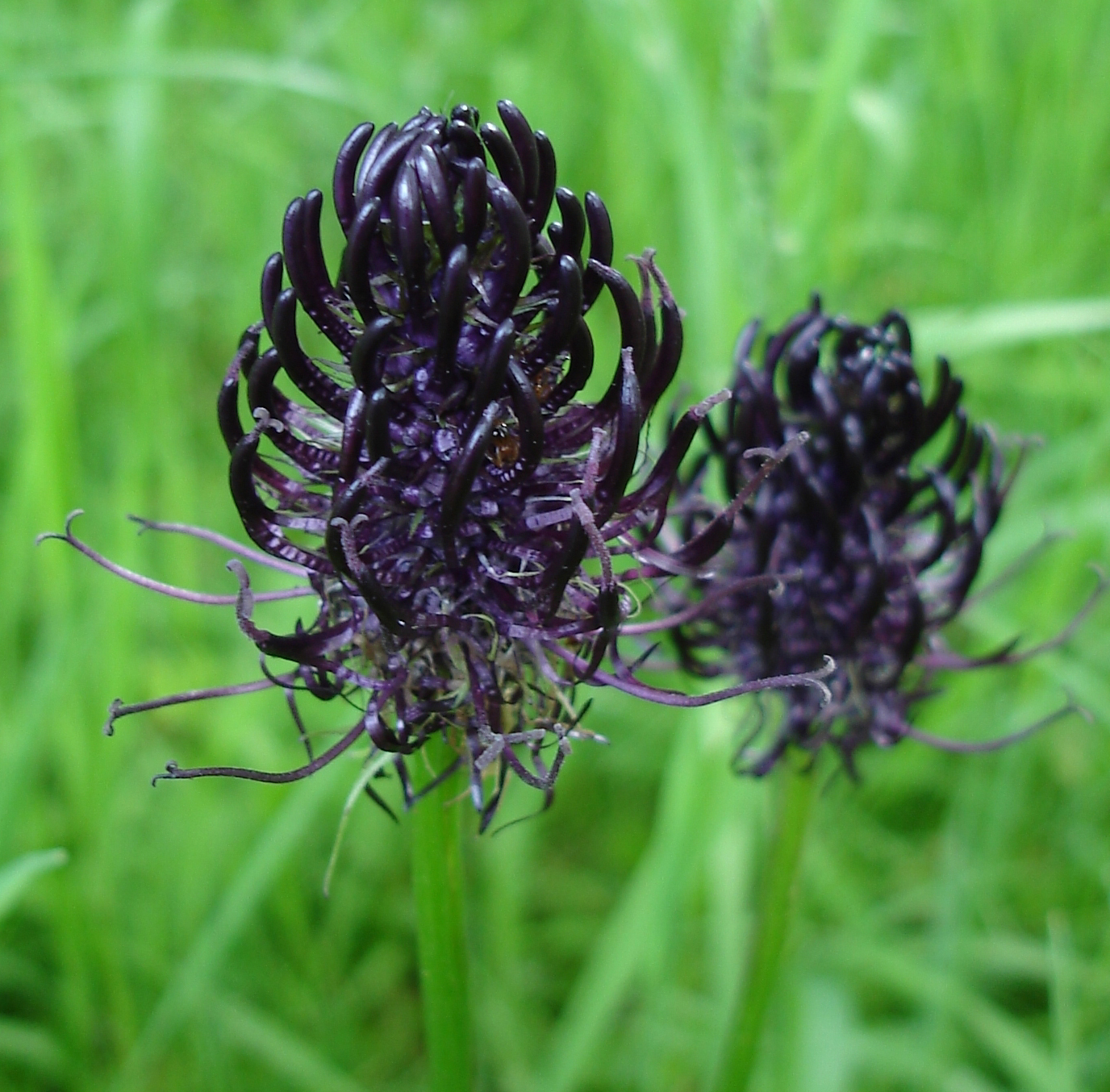 Phyteuma nigrum (Schwarze Teufelskralle).